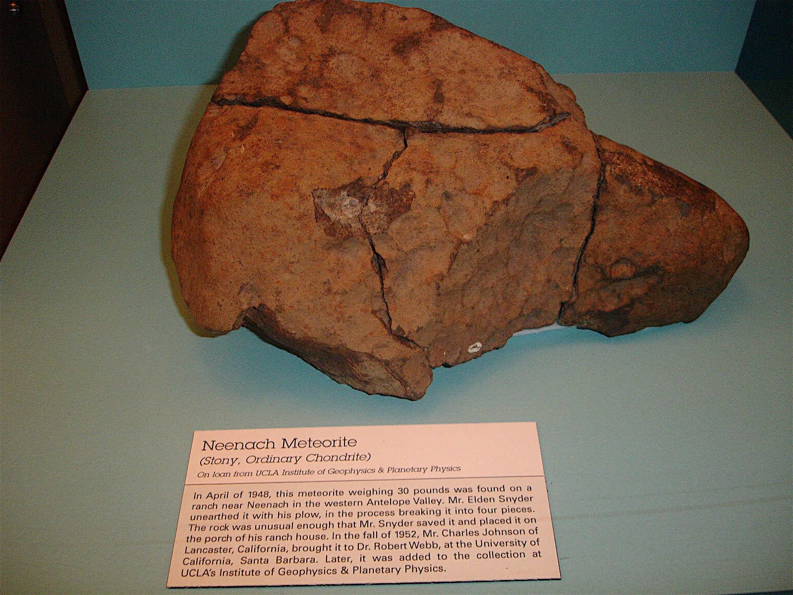 Neenach Meteorite